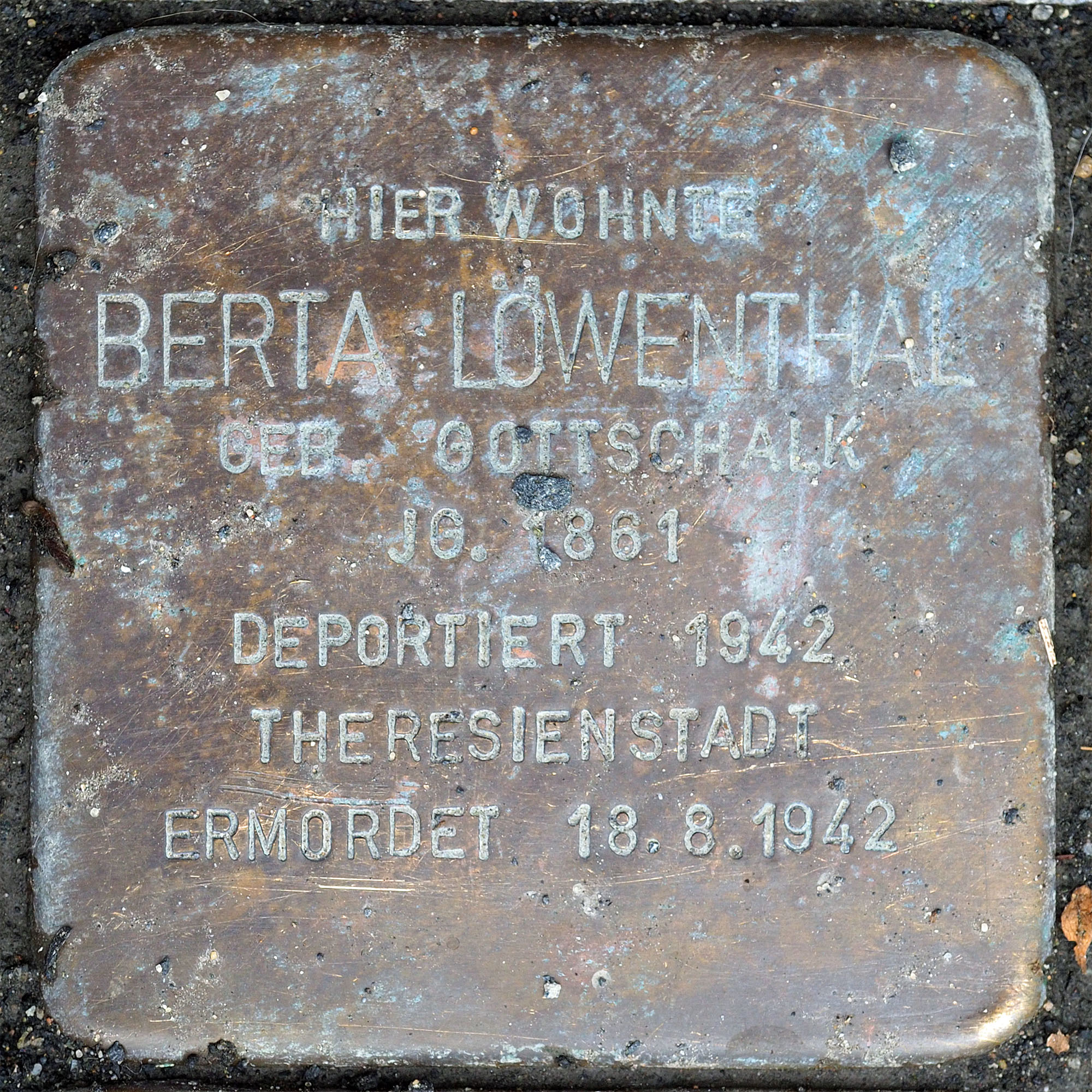 Stolpersteine GV: Löwenthal Berta